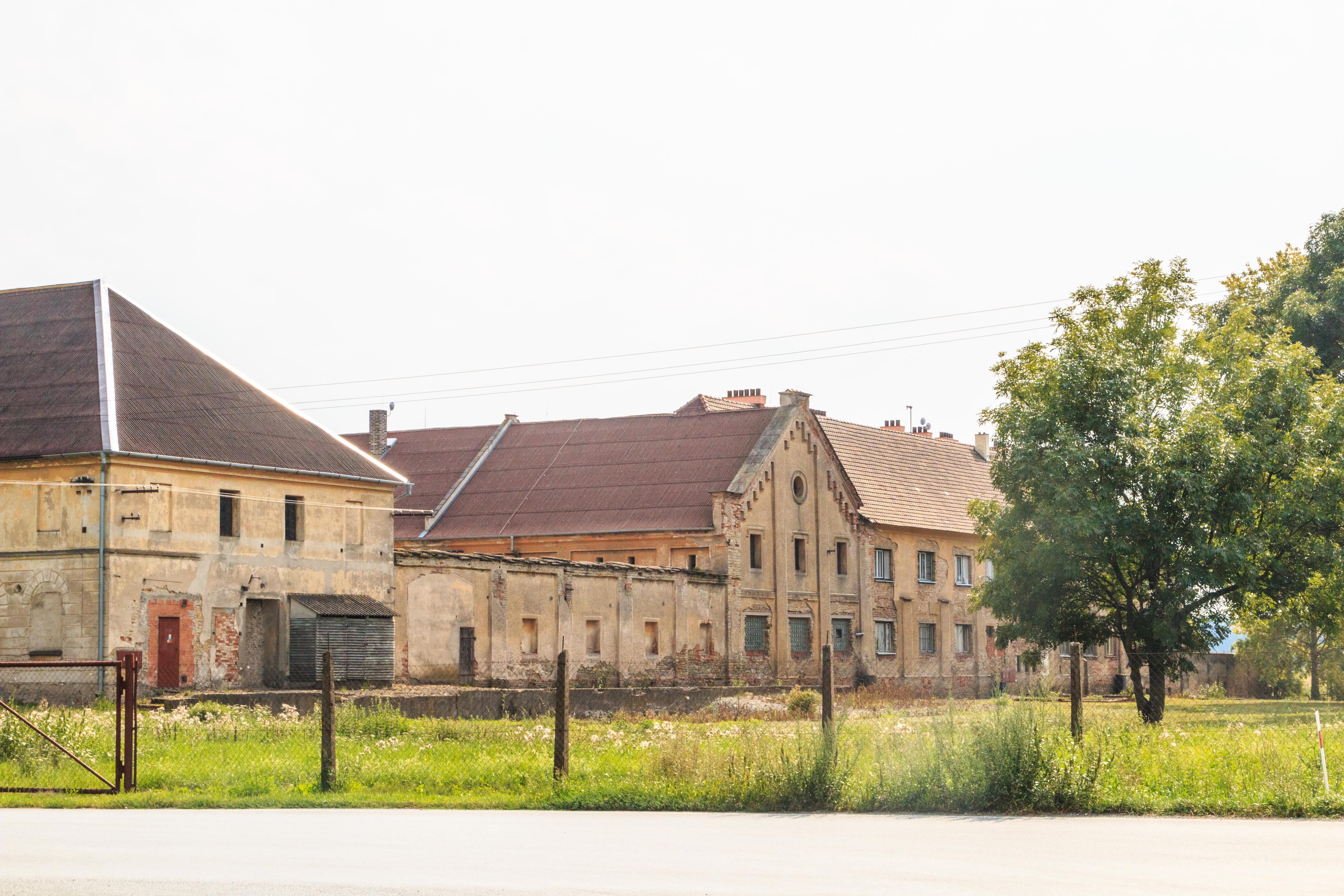 Statek Ostrov u Českého Meziříčí